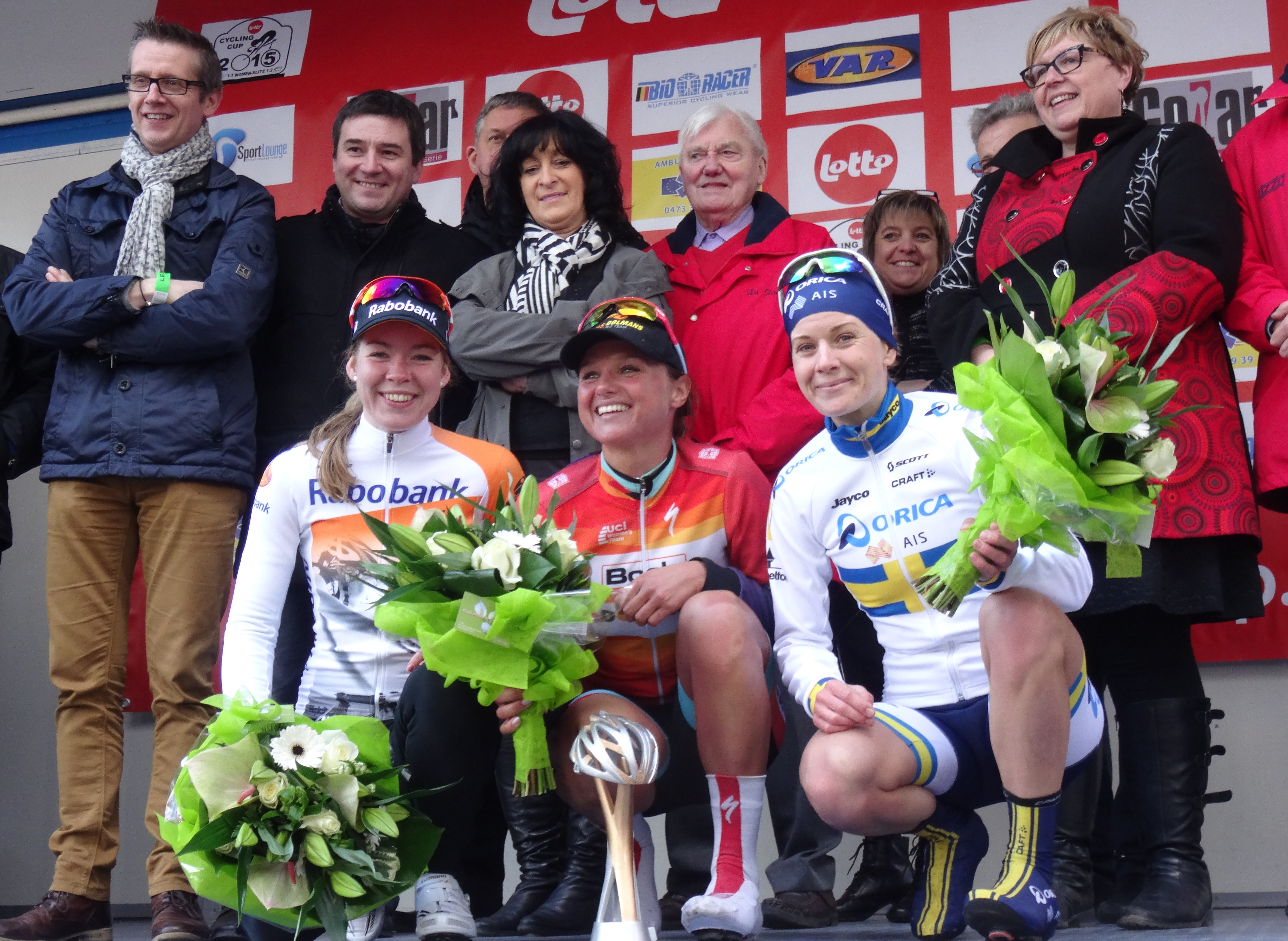 Reportage réalisé le mercredi 4 mars à l'occasion de l'arrivée du Samyn des Dames 2015 et du Samyn 2015 à Dour, Belgique.